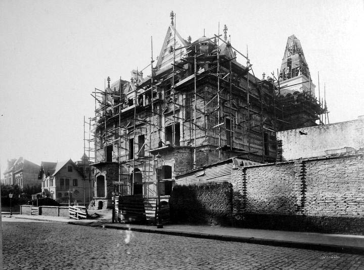 La residencia de Alejandro Hume en la Avenida Alvear, diseñada por Carlos Ryder, en construcción hacia 1891 o 1892.